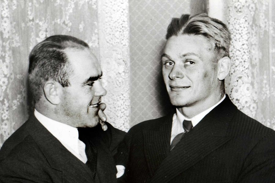 August Neo and Kristjan Palusalu in Tallinn